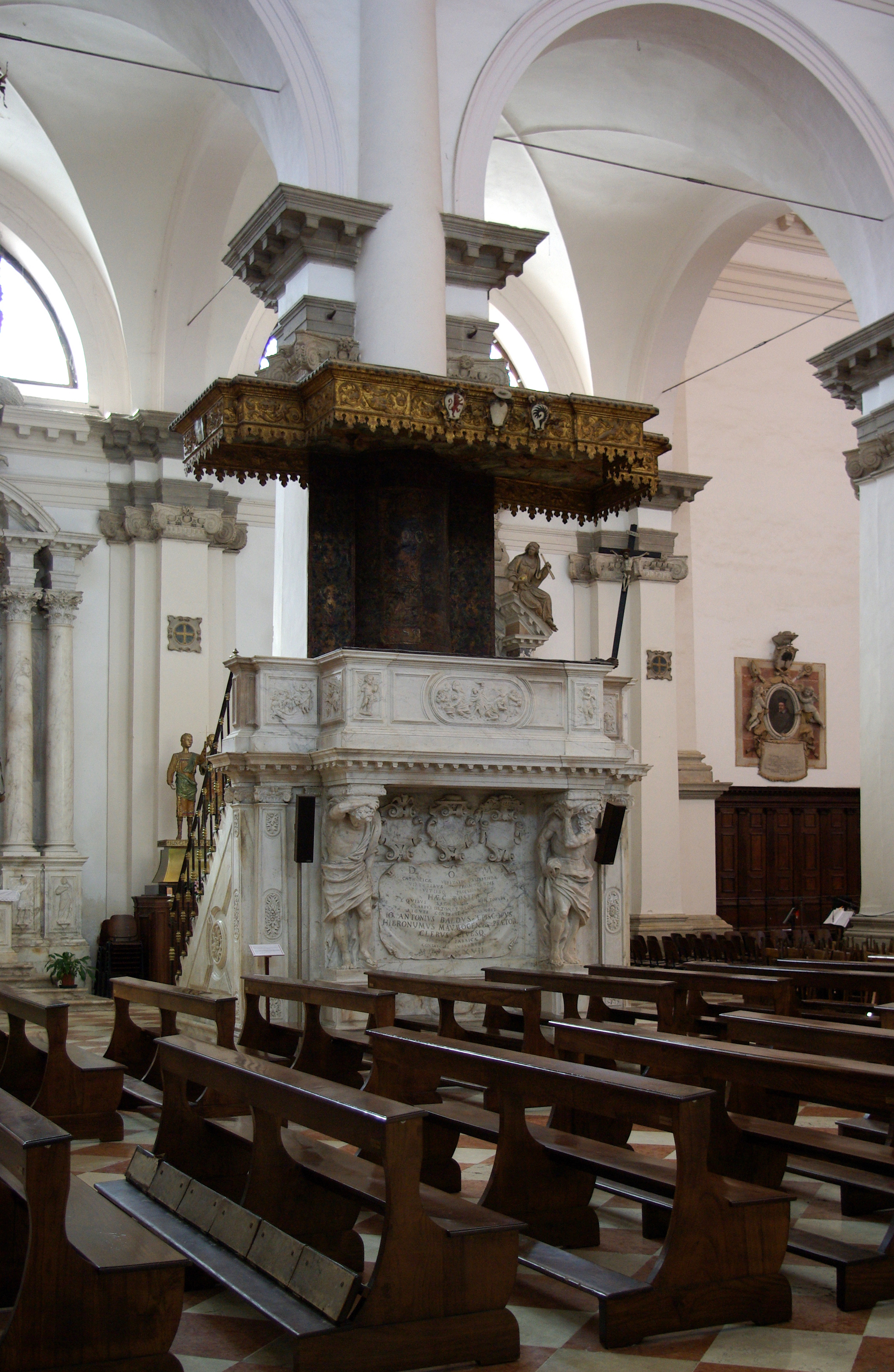 Chioggia, Cattedrale di Santa Maria Assunta